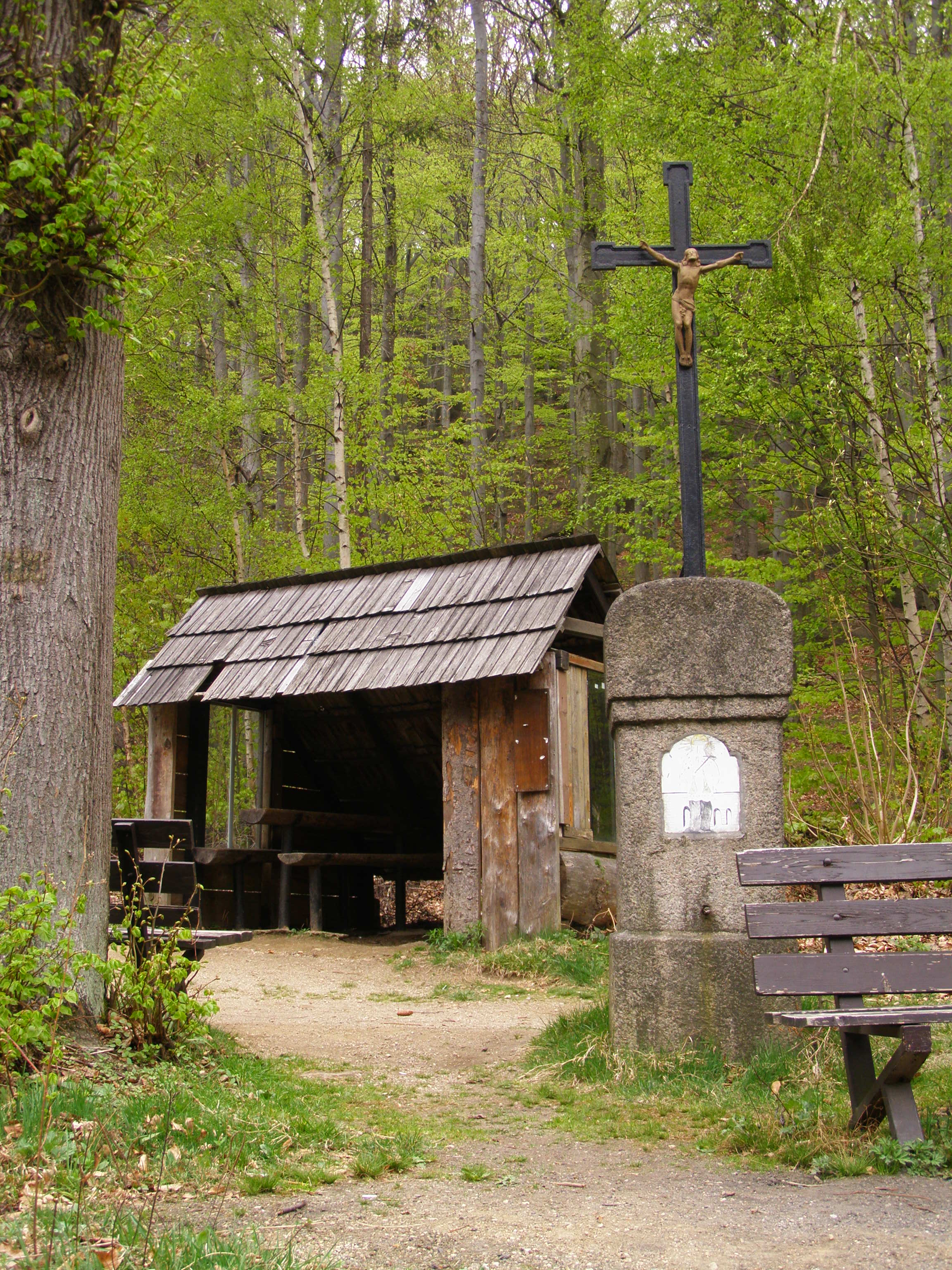 Oldřichovská vrchovina, NPR Jizerskohorské bučiny, kříž v Oldřichovském sedle